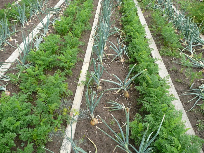 Gelbe Rüben und Zwiebeln in Mischkultur; Companion planting of carrots and onions